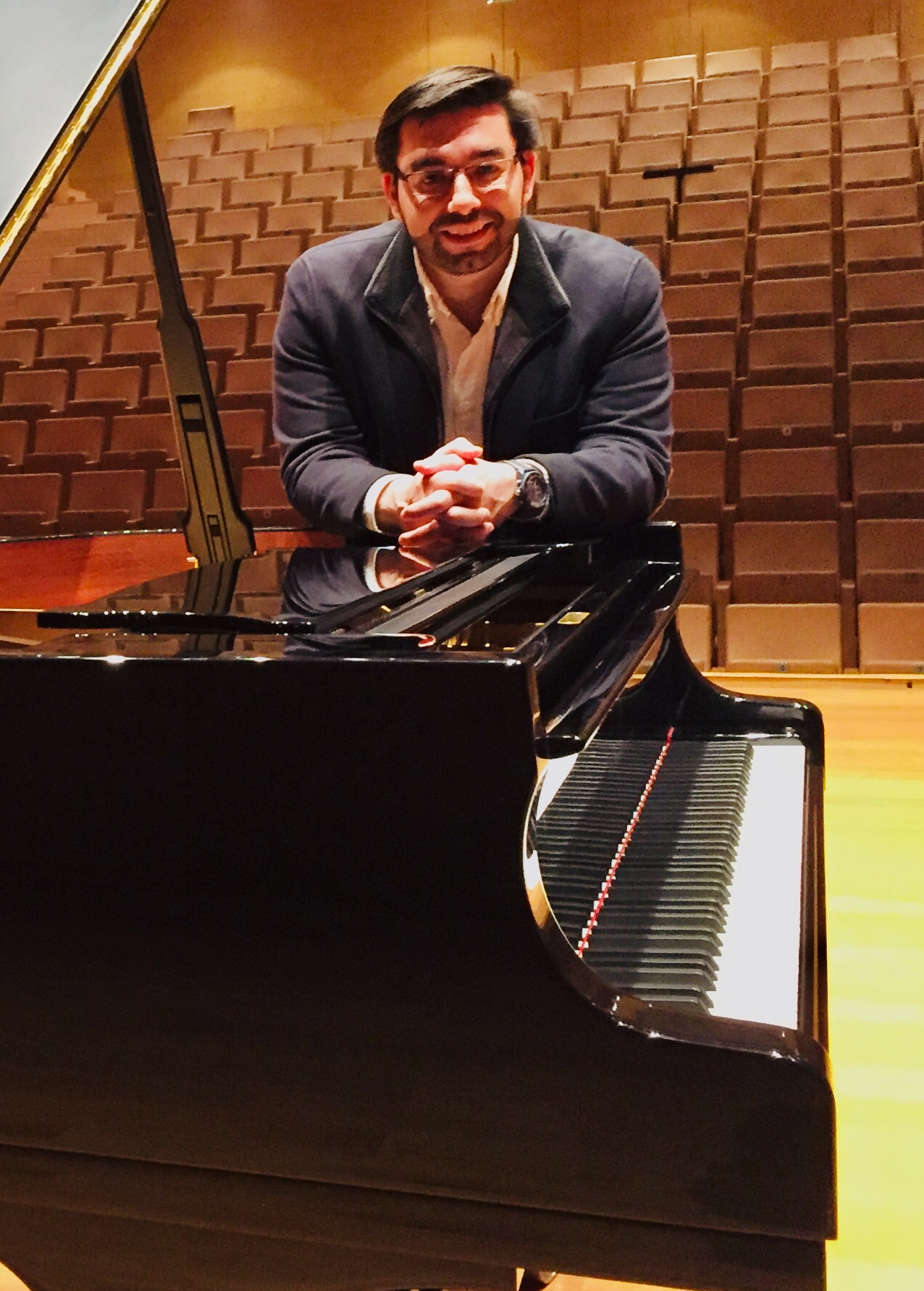 Ernesto Monsalve, director de orquesta español, antes de un concierto en el Auditorio Miguel Delibes de Valladolid.